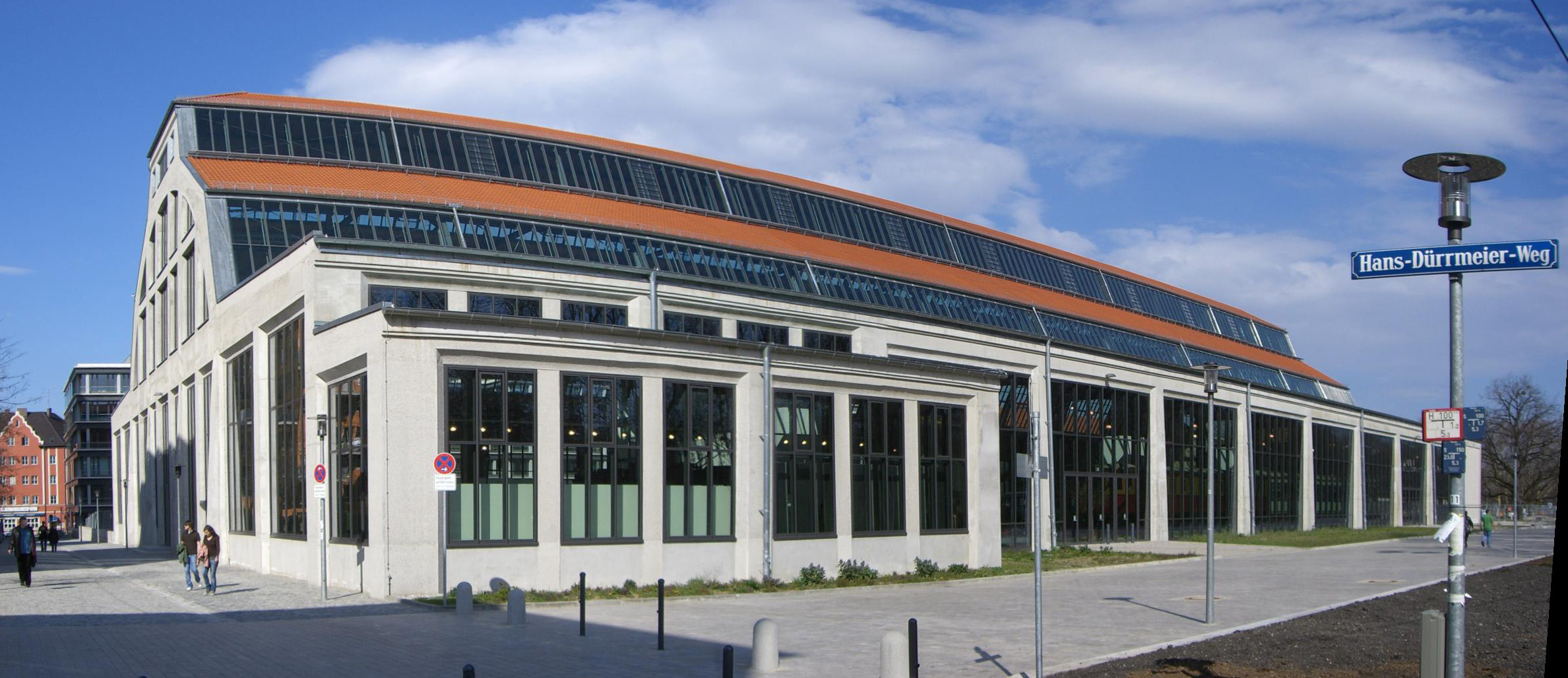 Das Verkehrsmuseum (eine Zweigstelle des Deutschen Museum) ist in einer Halle der ehemaligen Messe München auf der Theresienhöhe untergebracht